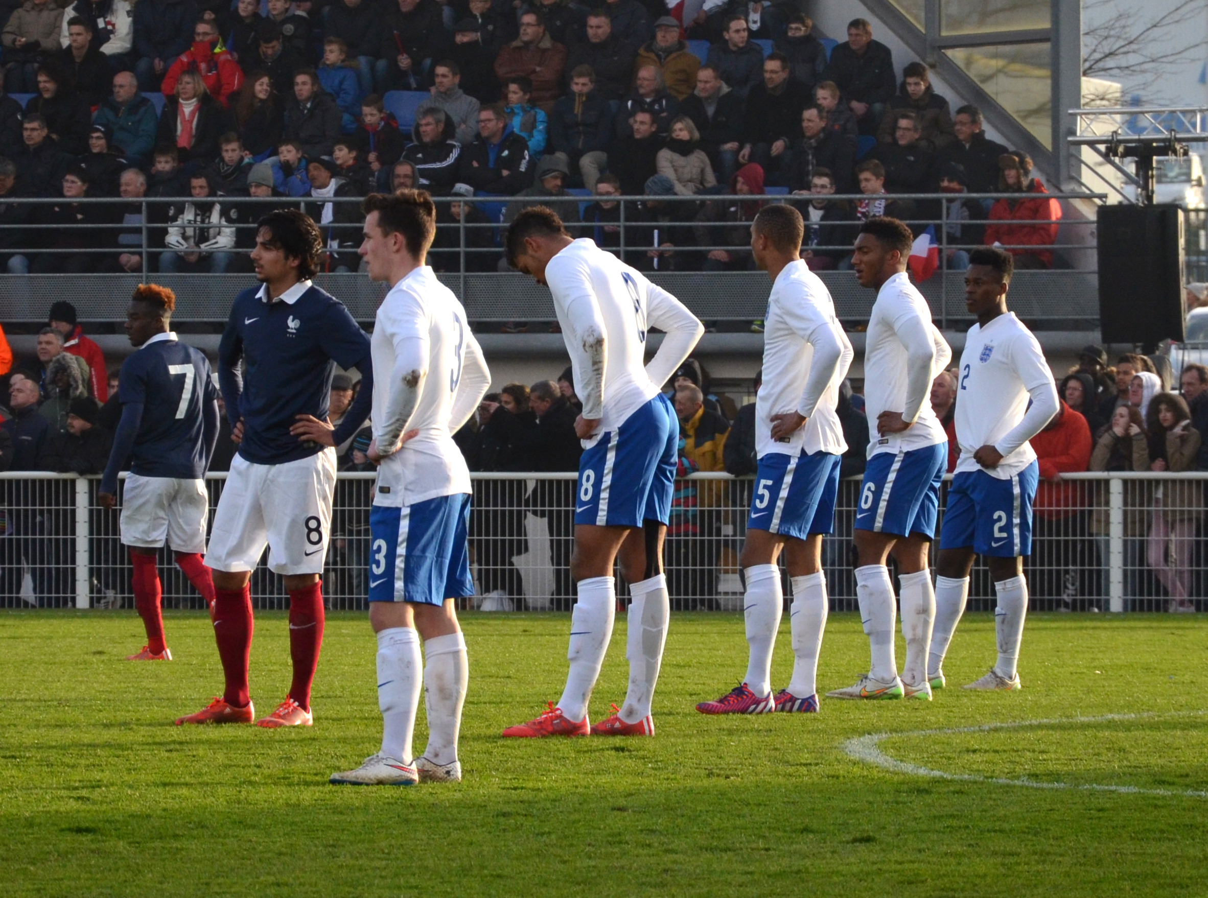 Photographie prise lors du match opposant la France à l'Angleterre pour les qualifications du championnat d'Europe de football des moins de 19 ans 2015 au stade Louis-Villemer de Saint-Lô le 31 mars 2015. Ici, Maxwell Cornet et Samed Kilic devant la défense anglaise (Ben Chilwell, Ruben Loftus-Cheek, Brendan Galloway, Joseph Gomez et Ashley Smith-Brown).